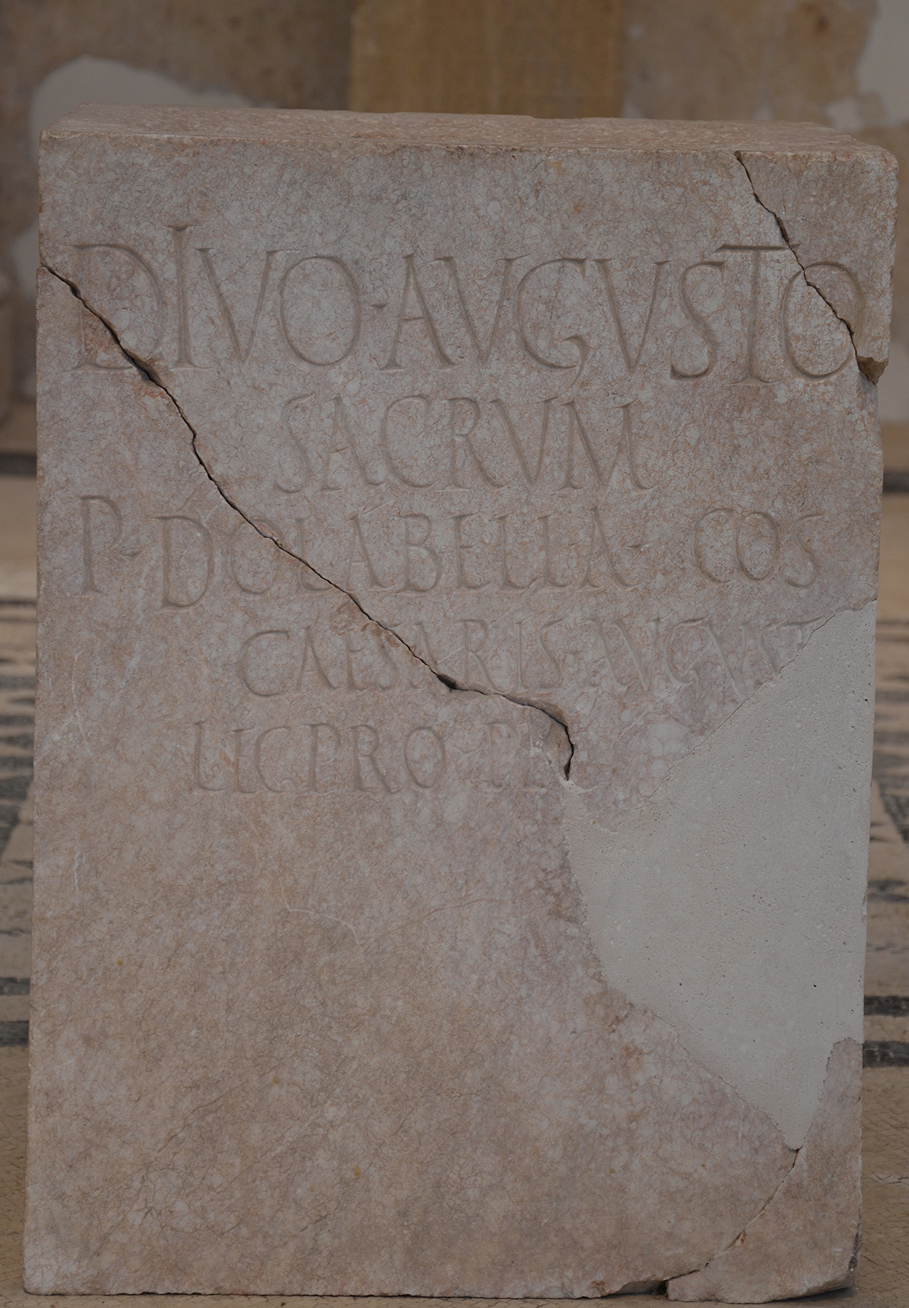 Archaeological museum Narona, Vid, Croatia. AE 1999, 1223 = AE 2002, 144 = AE 2002, 1116 = AE 2011, 921: Divo Augusto / sacrum / P(ublius) Dolabella co(n)s(ul) / Caesaris August(i) / leg(atus) pro pr(aetore)